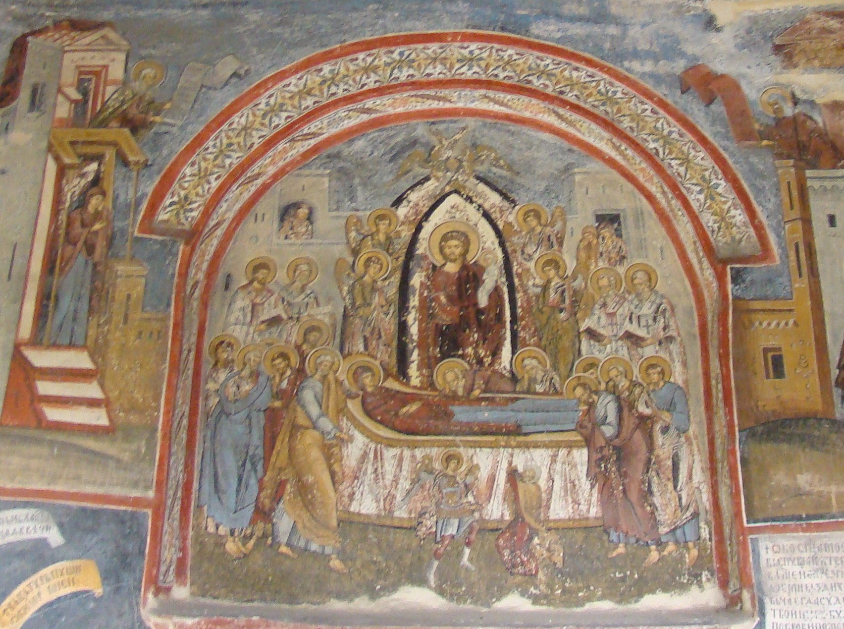 Bolnița „Adormirea Maicii Domnului”, Mănăstirea Hurezi, Vâlcea